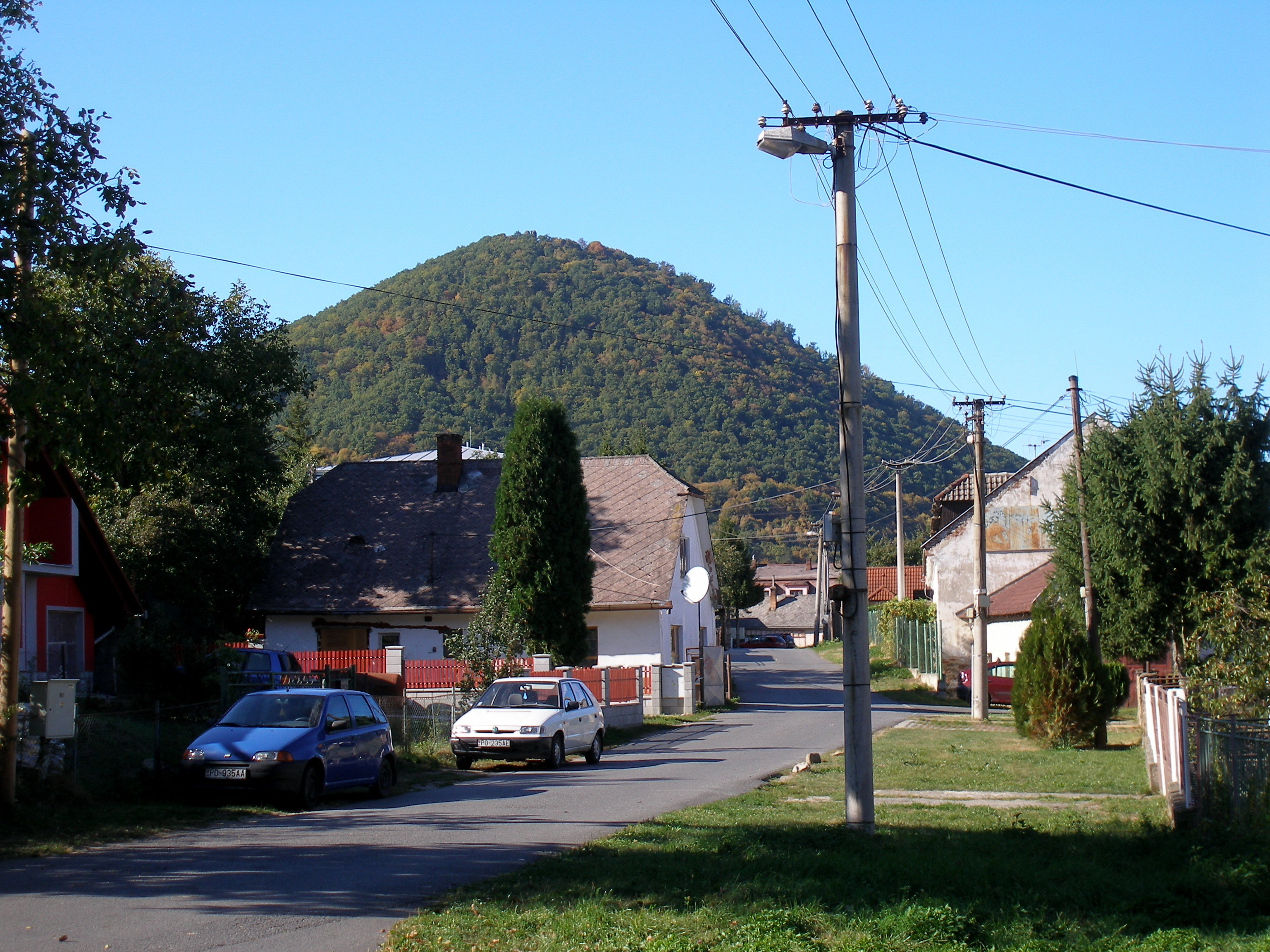 Mesto Veľký Šariš okres Prešov.